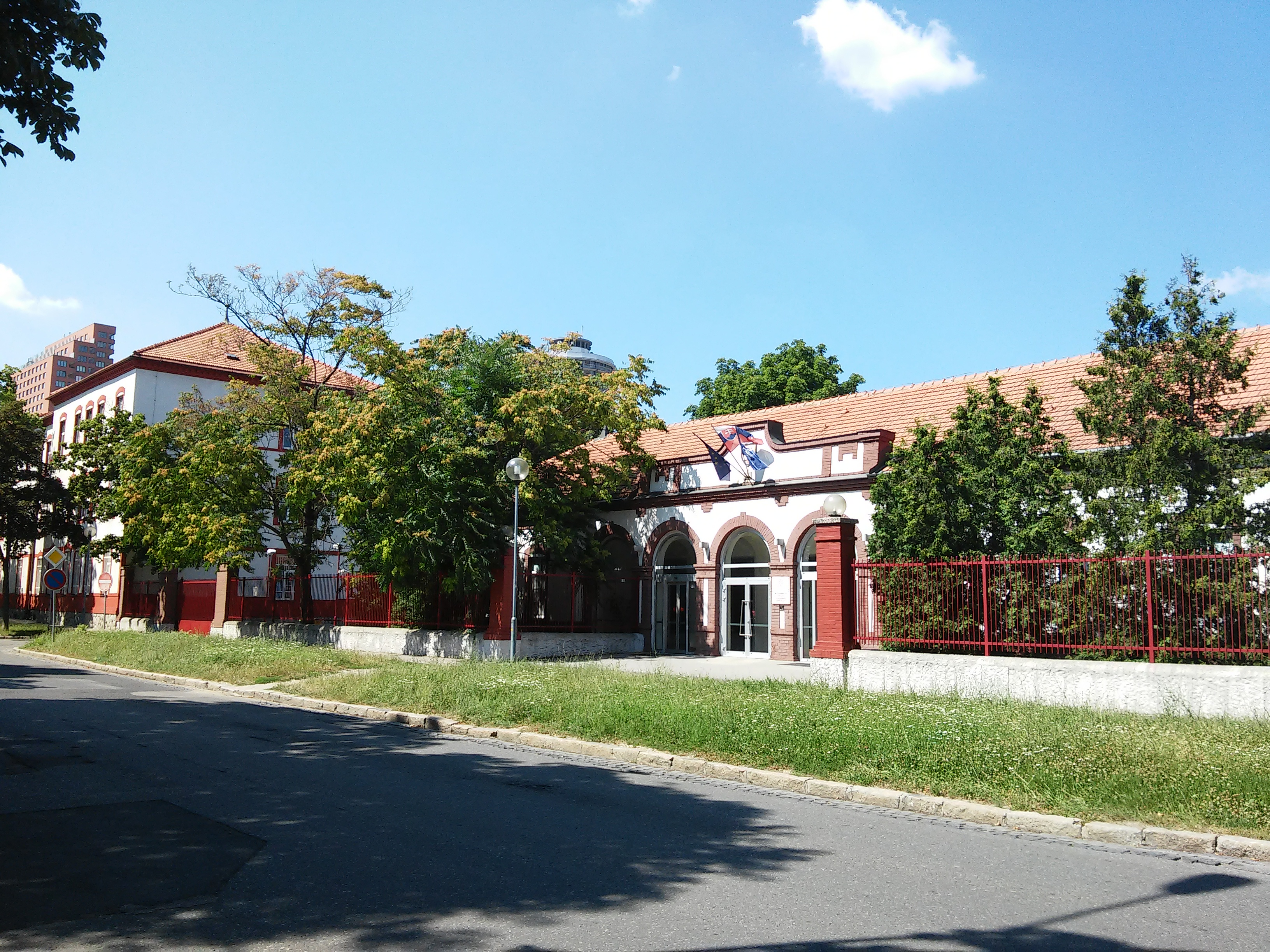 Kutuzovova, Nové Mesto, Bratislava